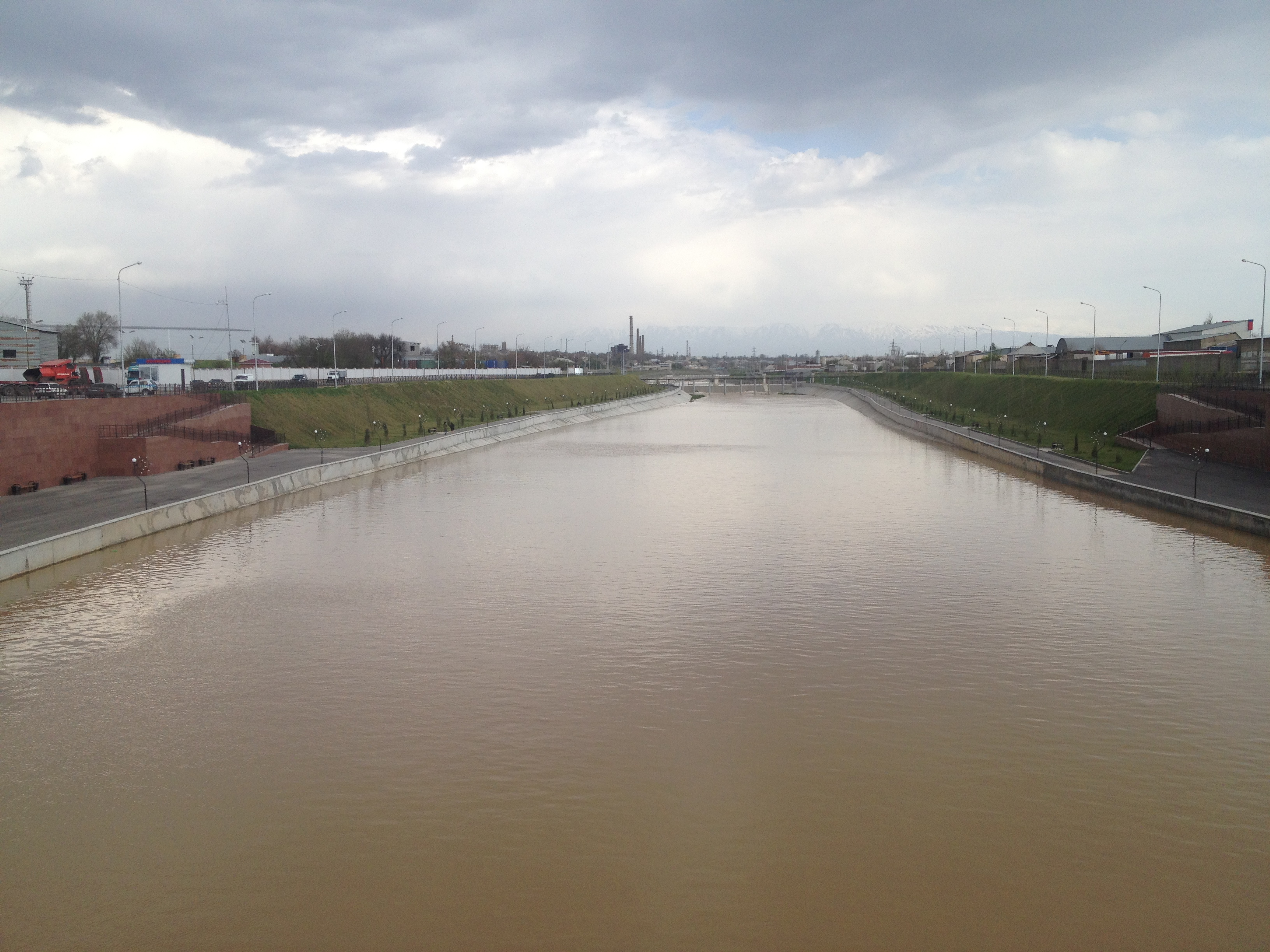 Река Бадам в Шымкенте